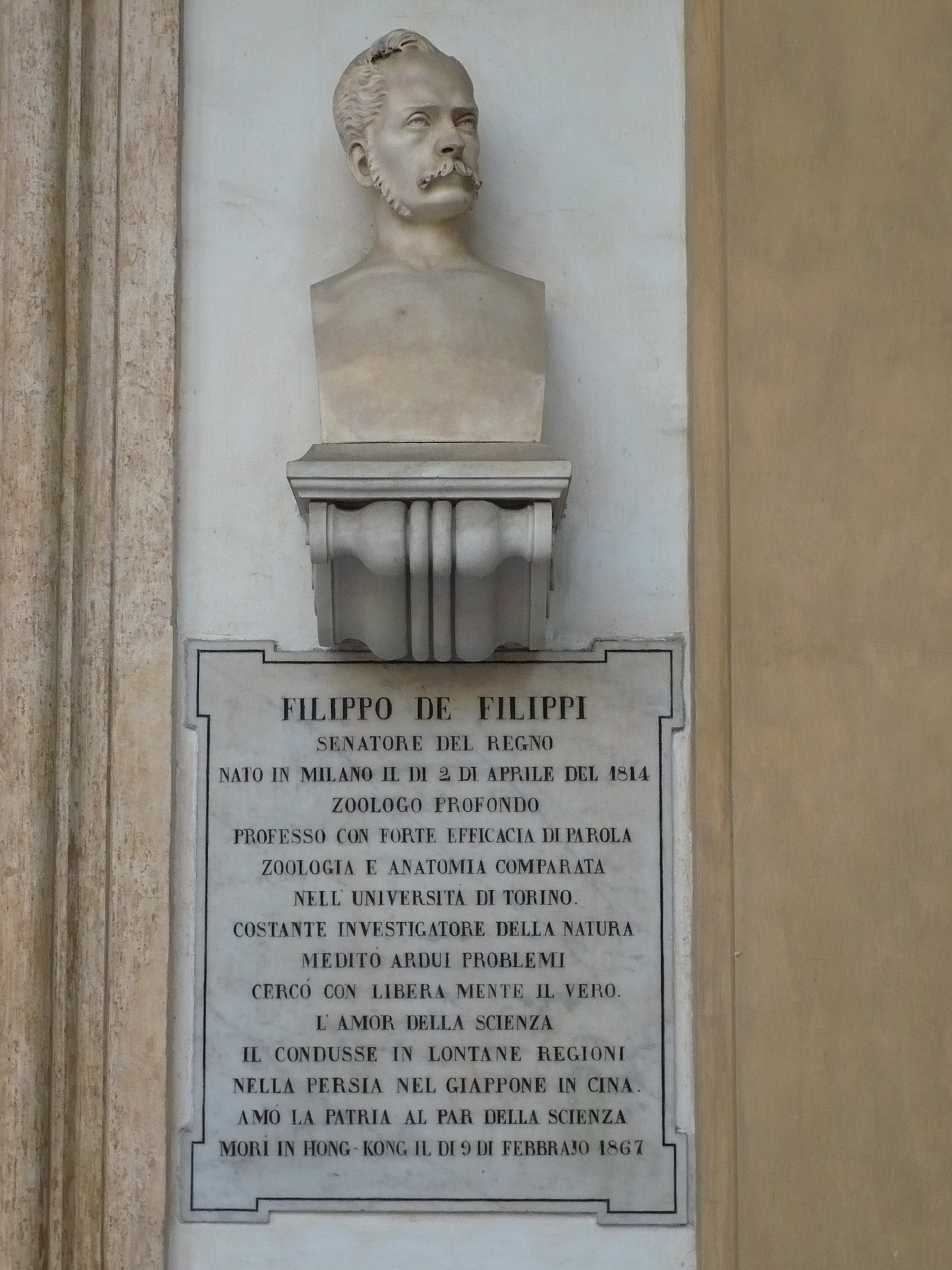 Busto dello zoologo Filippo De Filippi (1814-1867) che fu professore all'Università di Torino (dal 1848 al 1865) e senatore. Il busto, scolpito da Giacomo de Barbieri nel 1868, fa parte della galleria di uomini illustri nel loggiato del Palazzo dell'Università di Torino, in via Po 17.